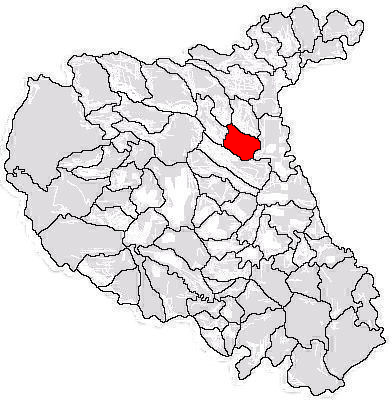 Categorie:Hărţi ale judeţului Vrancea